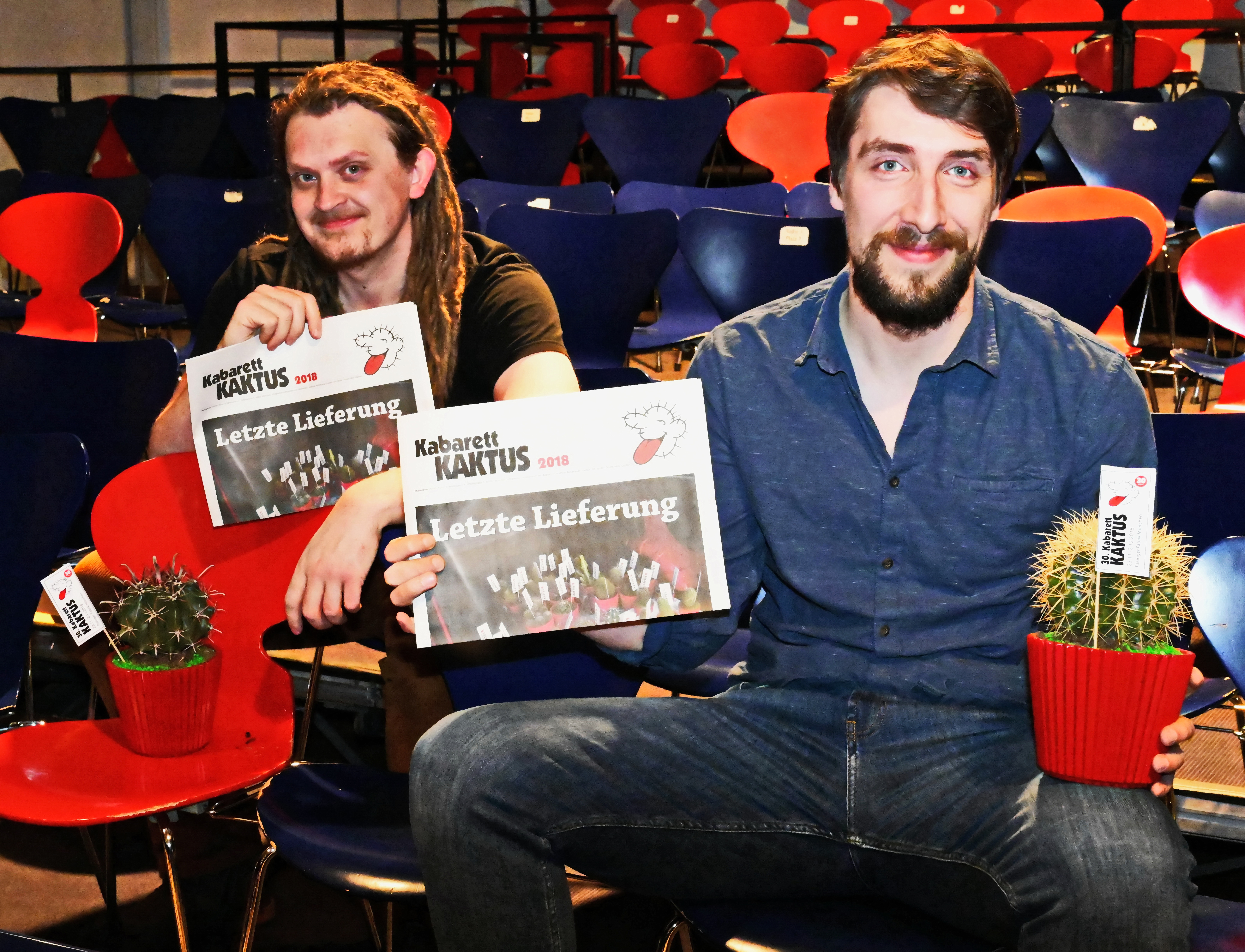 Die Preisträger beim letzten Kabarett Kaktus, Konstantin Korovin und Juri von Stavenhagen